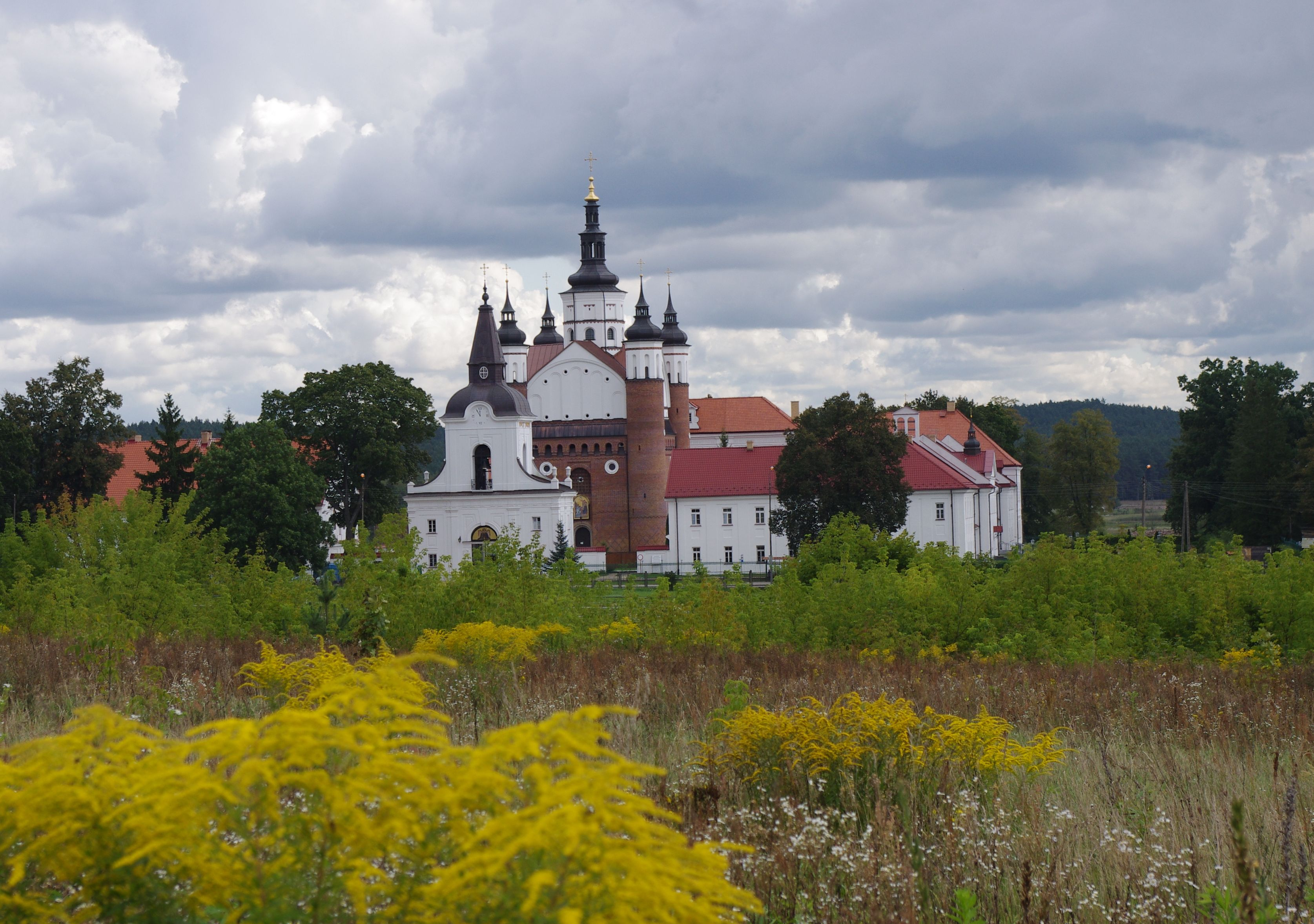 Zespół klasztorny bazylianów w Supraślu (zabytek nr rejestr. od 24 do 27)